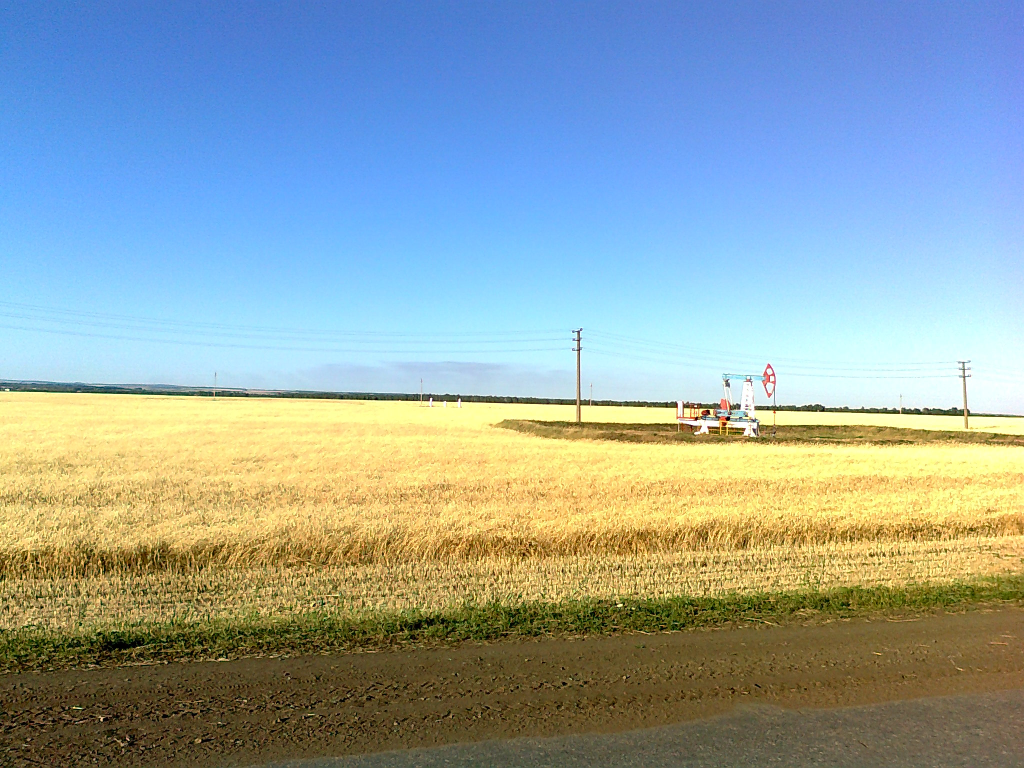 Татарча/tatarça: Семилетка авылы янындагы басу